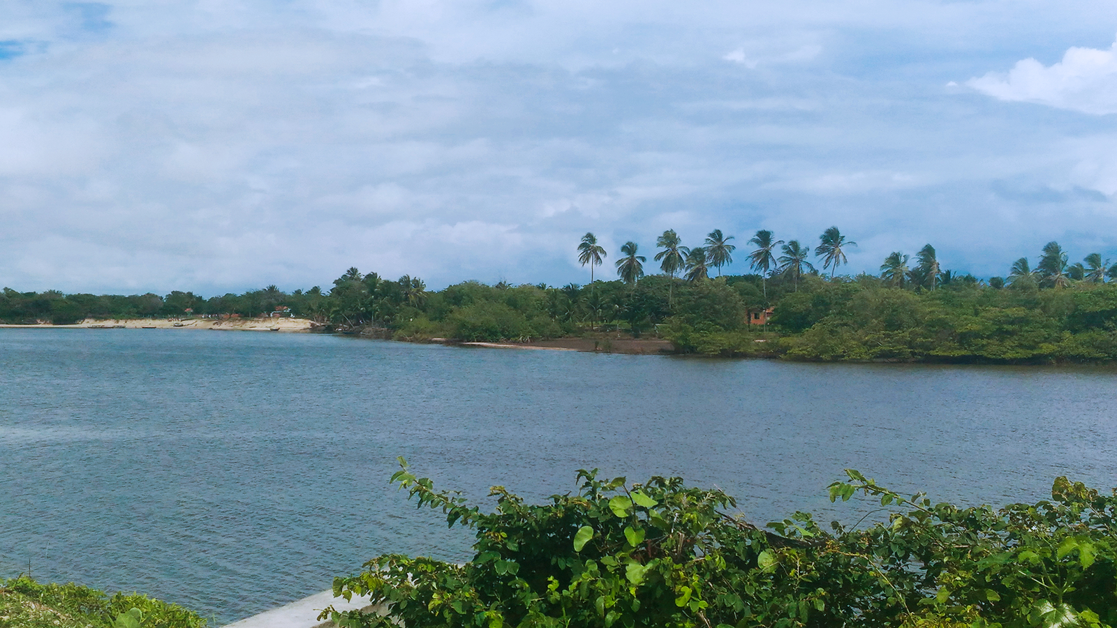 Foto tirada em frente à prefeitura de Paulino Neves, o nome do rio é o mesmo da cidade e faz parte do Rio Delta Parnaíba. Rio considerado novo, aproximadamente mais de100 anos, segundo moradores foi provocado por um rompimento de uma lagoa que existia na região.